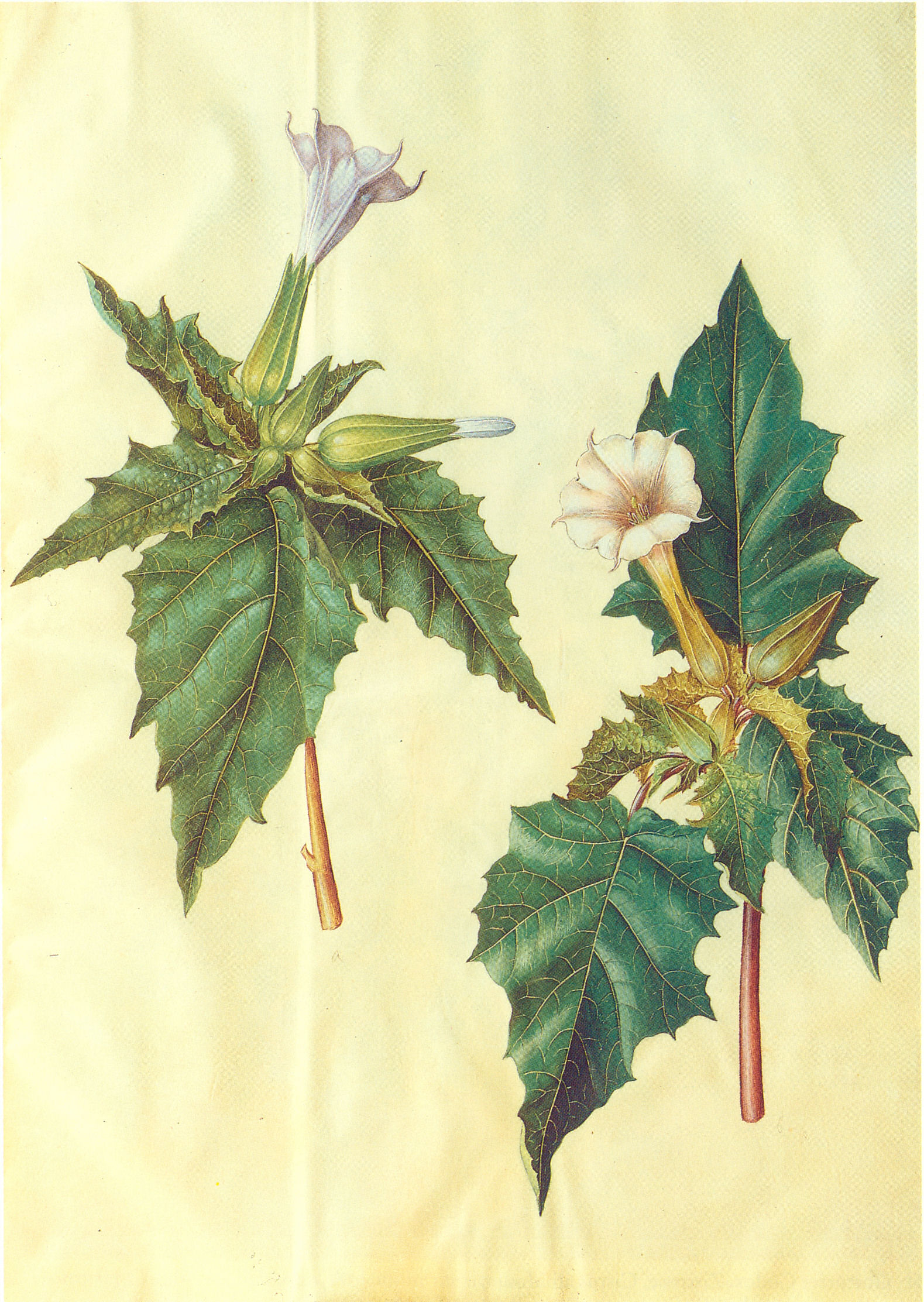 Datura Metel L. (Datura fastuosa L.), gouache on vellum, in: Gottorfer Codex